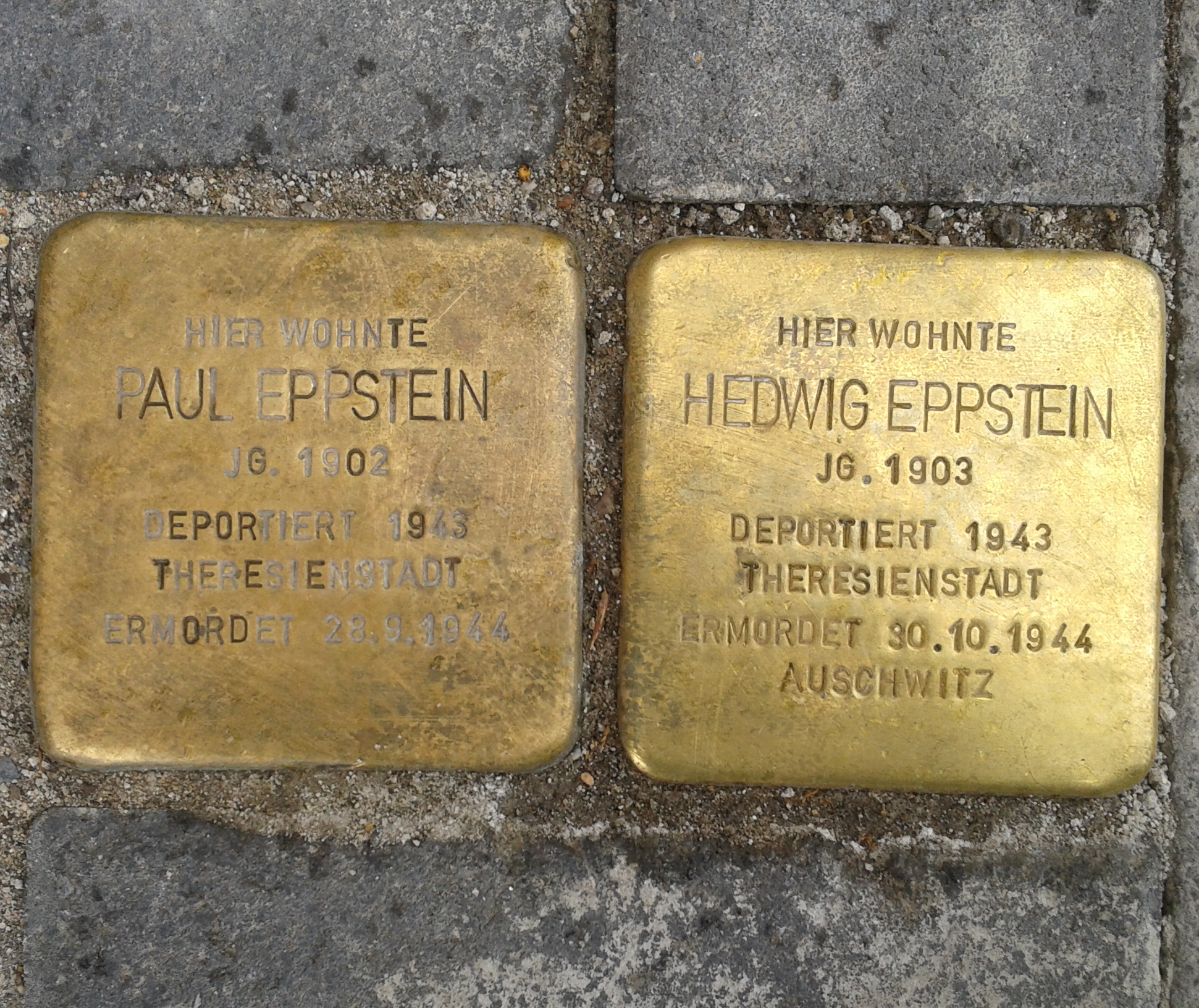 Stolperstein in Mannheim, Collinistr. 20